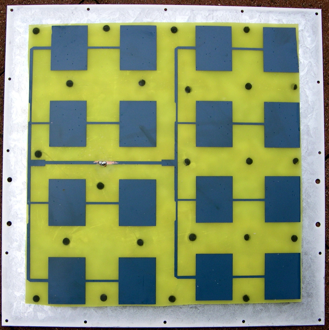 Details antenne planaire ISM 2.4 GHz.